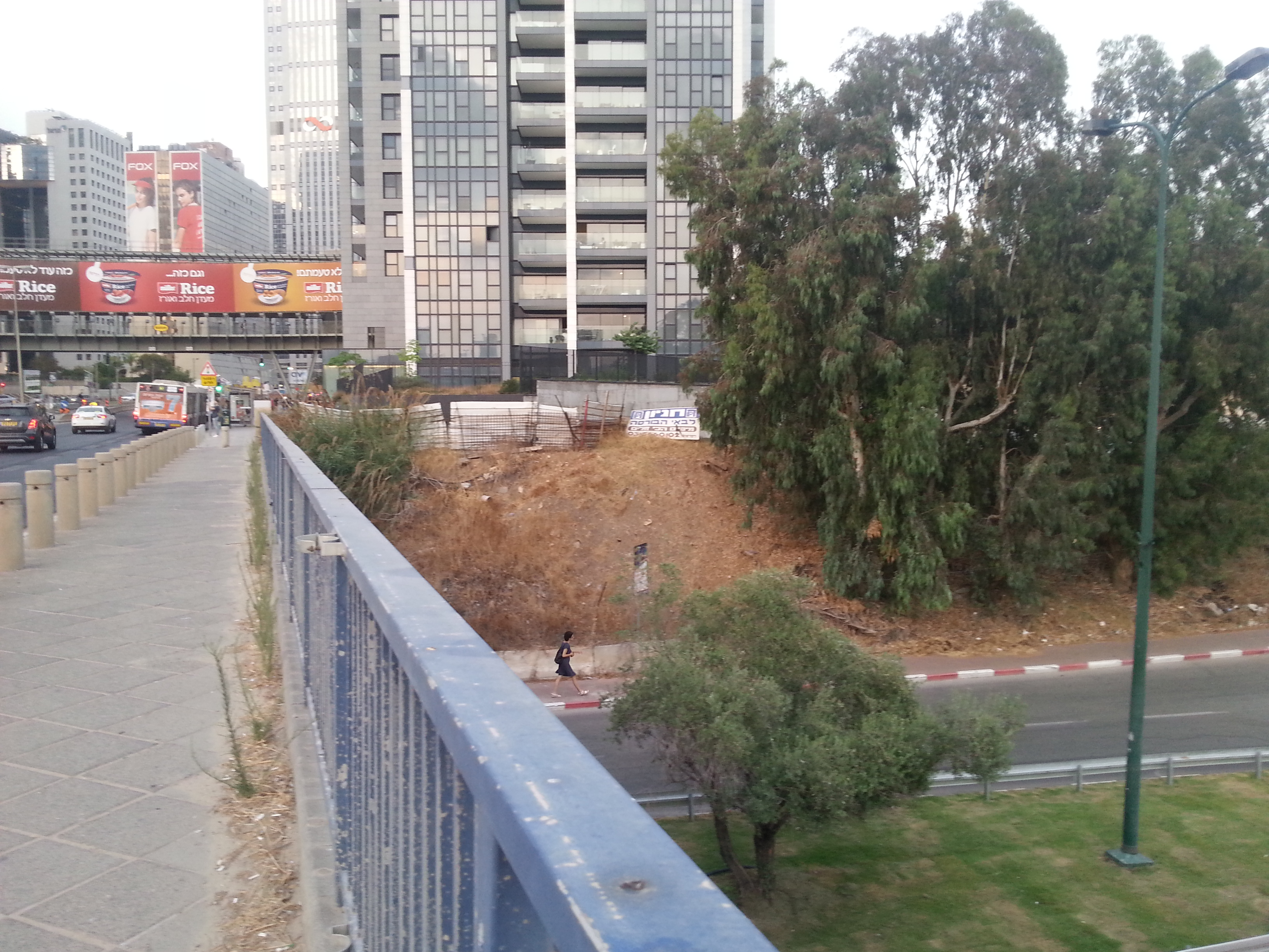 חלקו הצפוני של מחלף ארלוזורוב מעל גשר שרונה ההיסטורי. הרחוב שעובר מתחת לגשר הוא רחוב מנחם בגין ברמת גן, העובר בתוואי האפיק המקורי של ואדי מוסררה (נחל איילון) שהוסט למובל ניקוז. בתמונה עצי אקליפטוס בגדת האפיק הנחל .